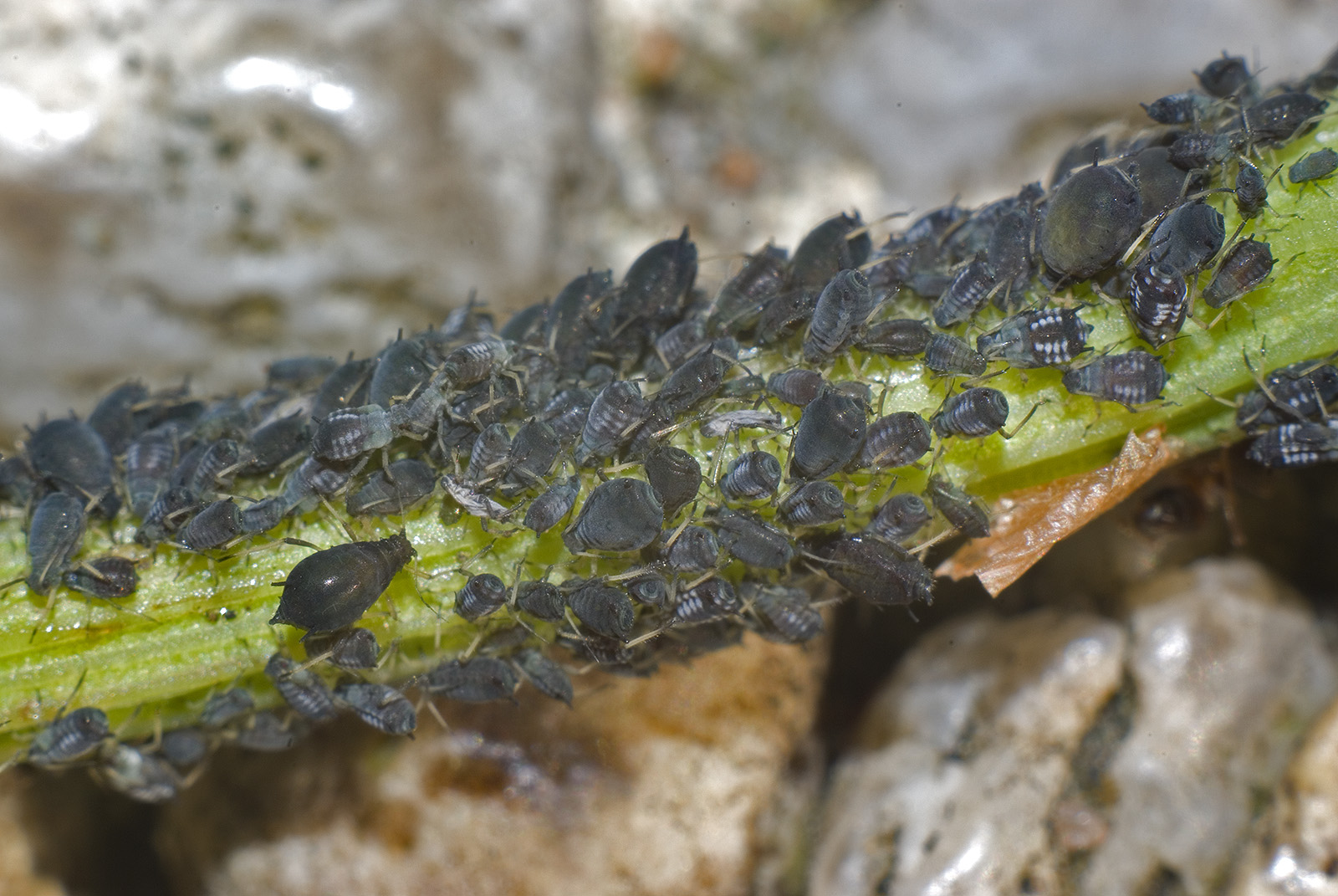 Blattläuse, die in Symbiose mit Ameisen leben.